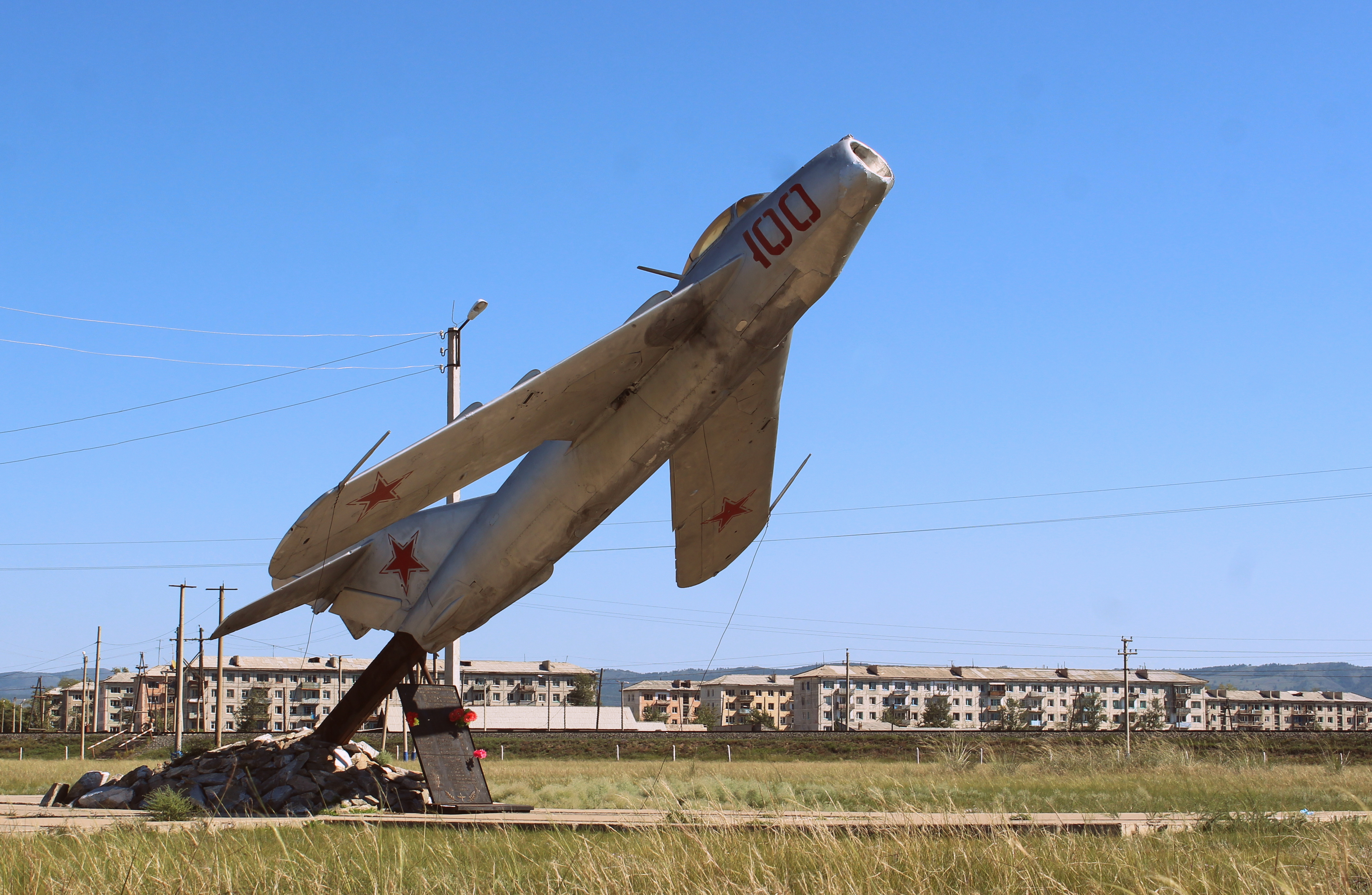 Самолет на въезде в поселок Джиду. Бурятия, Джидинский район